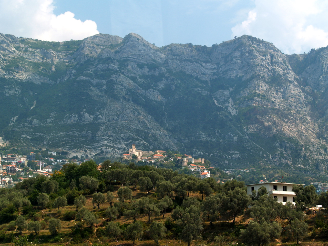 Kruje Albania